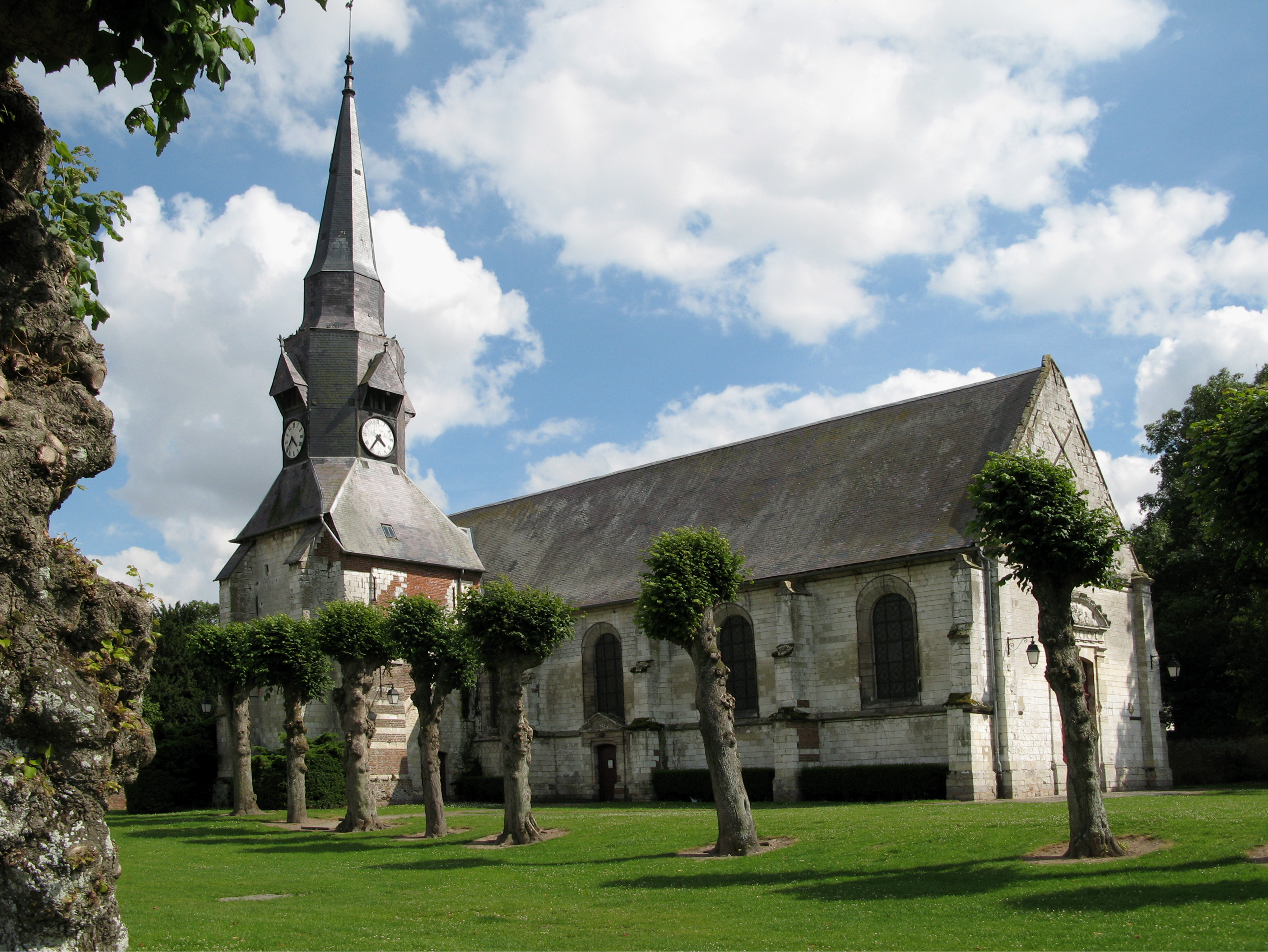 Revelles (Somme, France) - L'église. (clocher redressé par post-traitement informatique !).